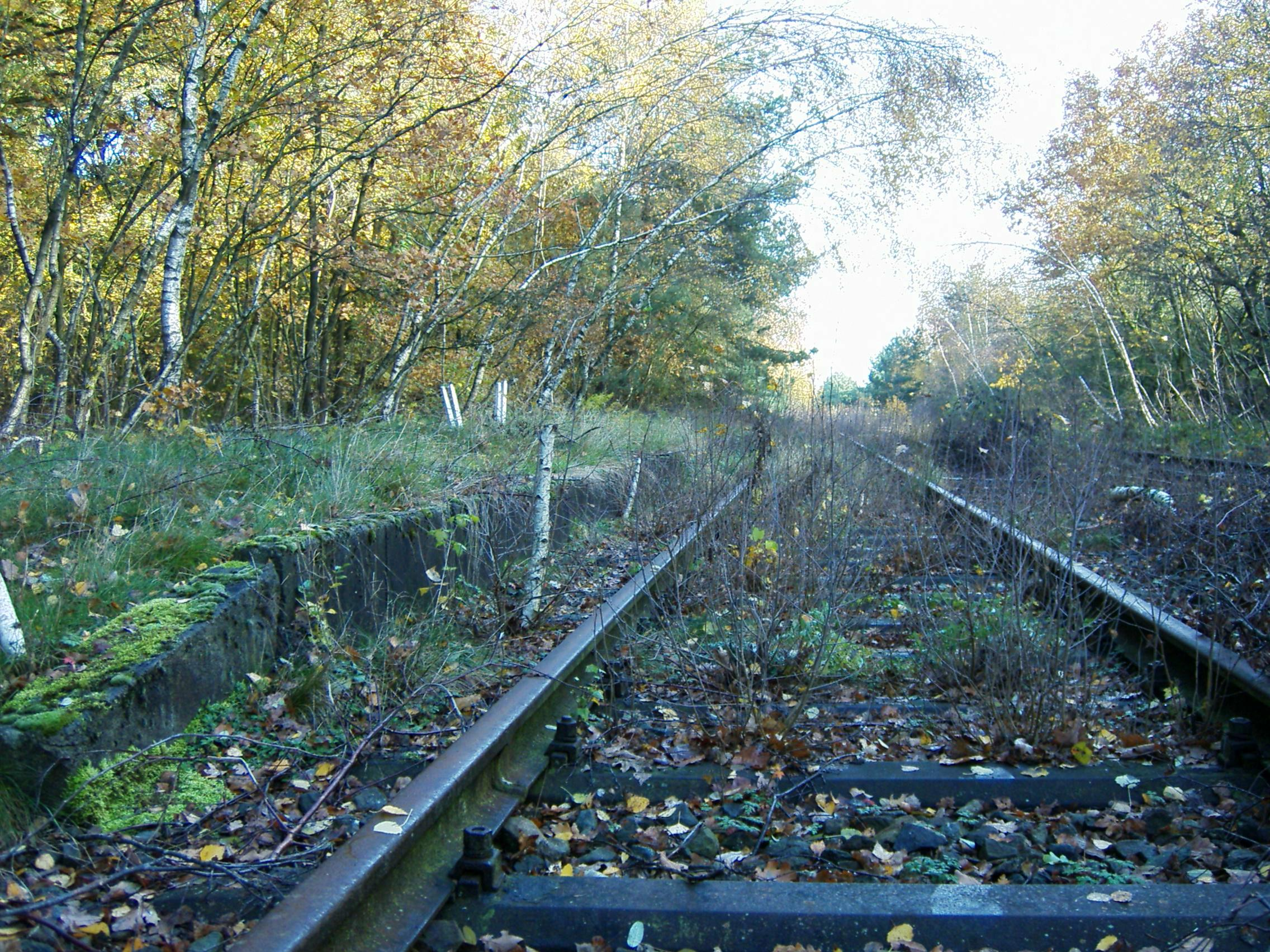 Bahnhof St. Arnold, Neuenkirchen/St. Arnold (Kreis Steinfurt) - Die Gleisanlagen am Ende des Bahnsteig. Neuenkirchen, Nordrhein-Westfalen, Deutschland. Ansicht von Südwesten Anmerkung: Die über die Gleise gebogenen jungen Birken zeugen vom Münsterländer Schneechaos, das sich ein Jahr zuvor ereignete.